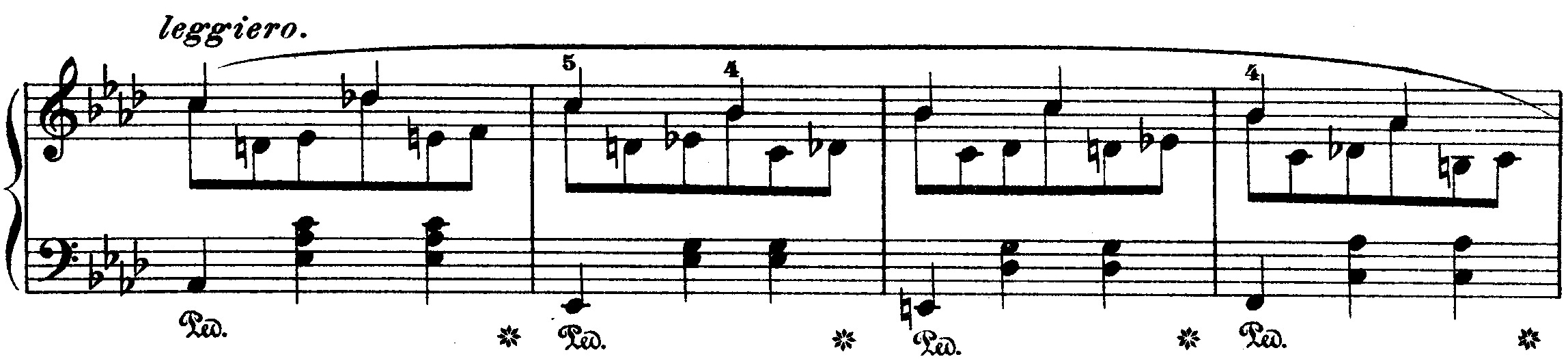 Первая тема Большого вальса As-dur, соч. 42 Фредерика Шопена. Издание Кароля Микули (1894).